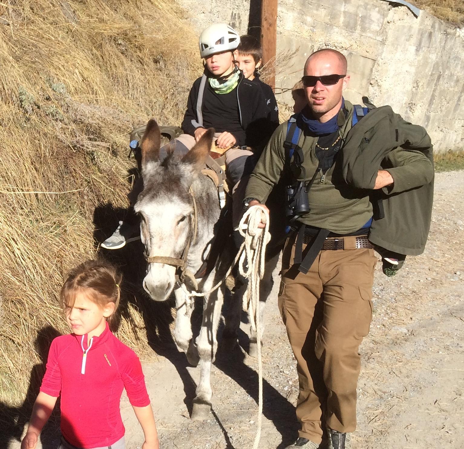 Elle est facilité par une location sur place (par exemple pour aller vers le vallon ou le col de Mirandol).